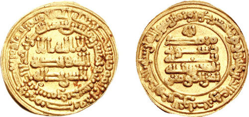 EARLY ISLAMIC, Abbasids. Abu-'Abdullah Muhammad al-Mu'tazz. 866-869. AV Dinar (4.18 gm, 5h). Samarkand mint. Dated AH 253 (867 AD). Kalima in three lines across fields, Quran 30.4-5 in outer margin, in outer margin, "bismillah struck was this dinar in Samarkand in the year three and fifty and two hundred" in inner margin / "Muhammad rasul Allah al-Mu'tazz billah al-amir al-muminin" in five lines across fields, "lillah" above; "Second Symbol" (Quran 9.33) in outer margin. Kazan -; BMC -; Album 235.1. VF. ($400)